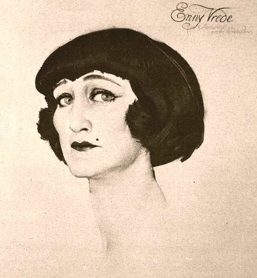 Enny Vrede